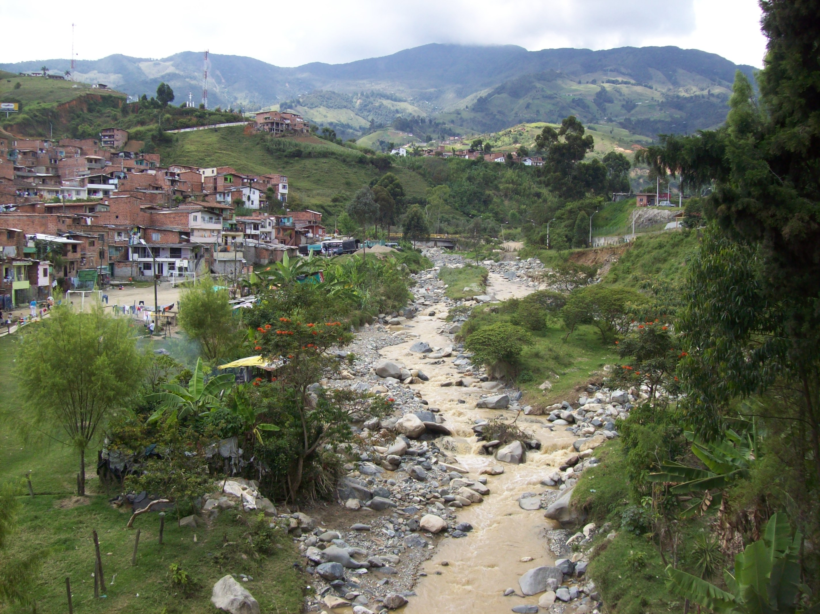 Vista de la quebrada La Iguaná a su paso por San Cristóbal, Medellín, desde en puente colgante.